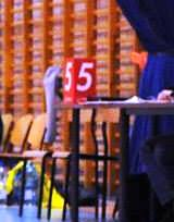 Marker fauli drużyny w koszykówce (stolik sędziowski)